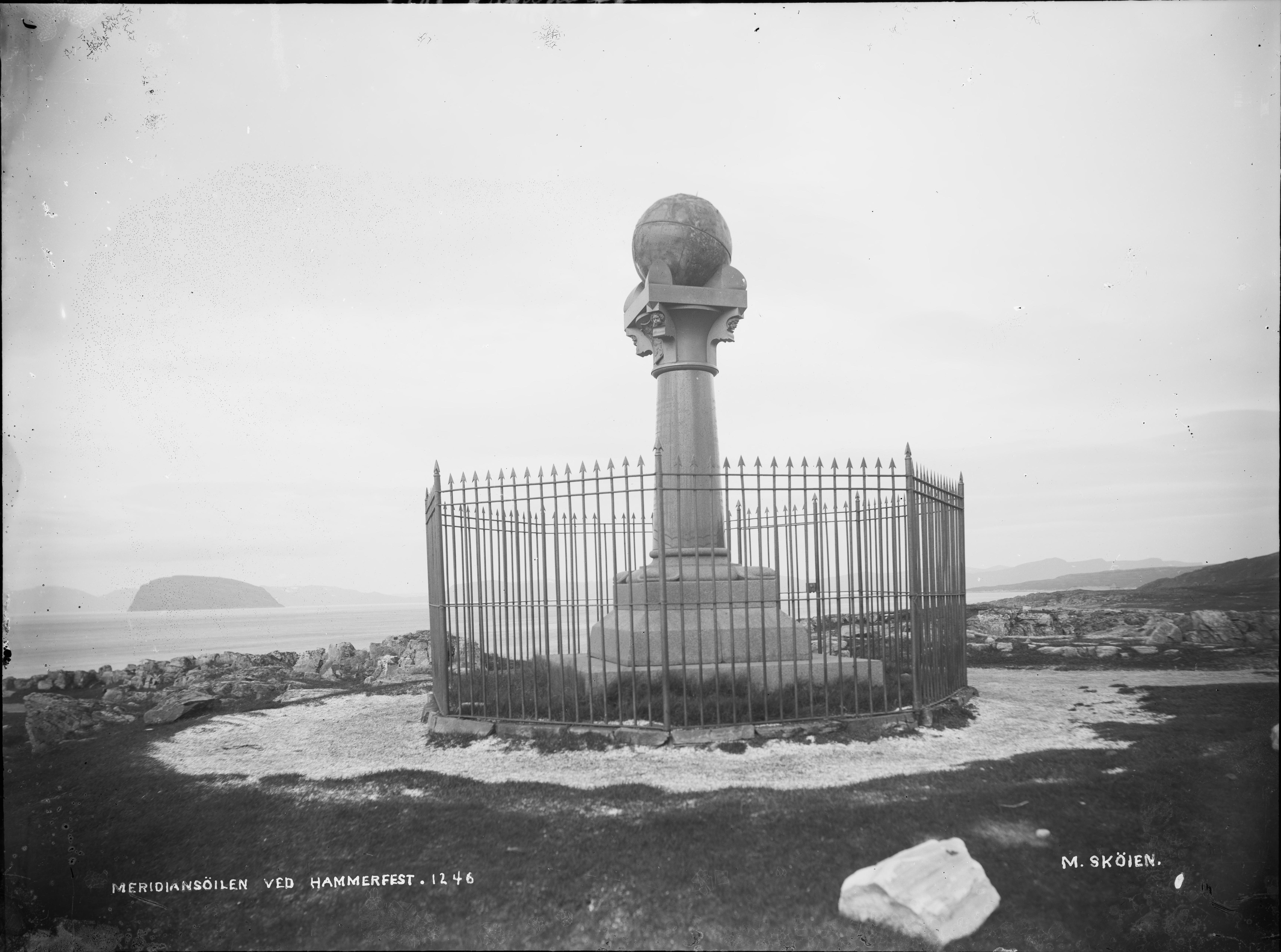 Påskrift negativ: Meridiansøilen ved Hammerfest 1246 M.Skøien Påskrift negativ: 448 Hammerfest [Riksantikvaren] Påskrift konvolutt: A448 Hammerfest Meridiansøilen [Riksantikvaren] Sted: Fuglenes,Hammerfest Kommune: Hammerfest Fylke: Finnmark Tagger: landskap Meridianstøtten